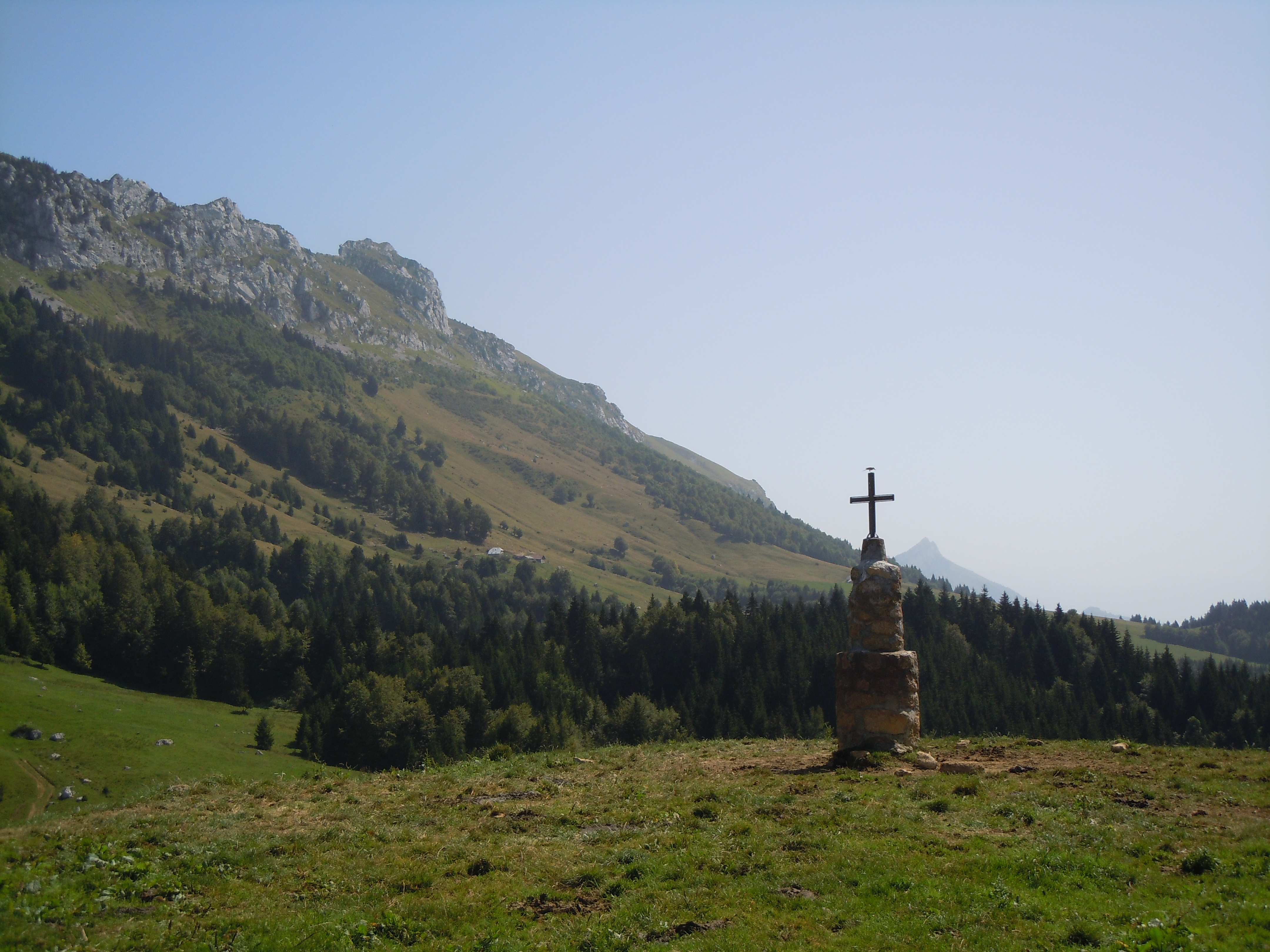 Dent des Portes depuis le Clalet du Mollard (1343 m)